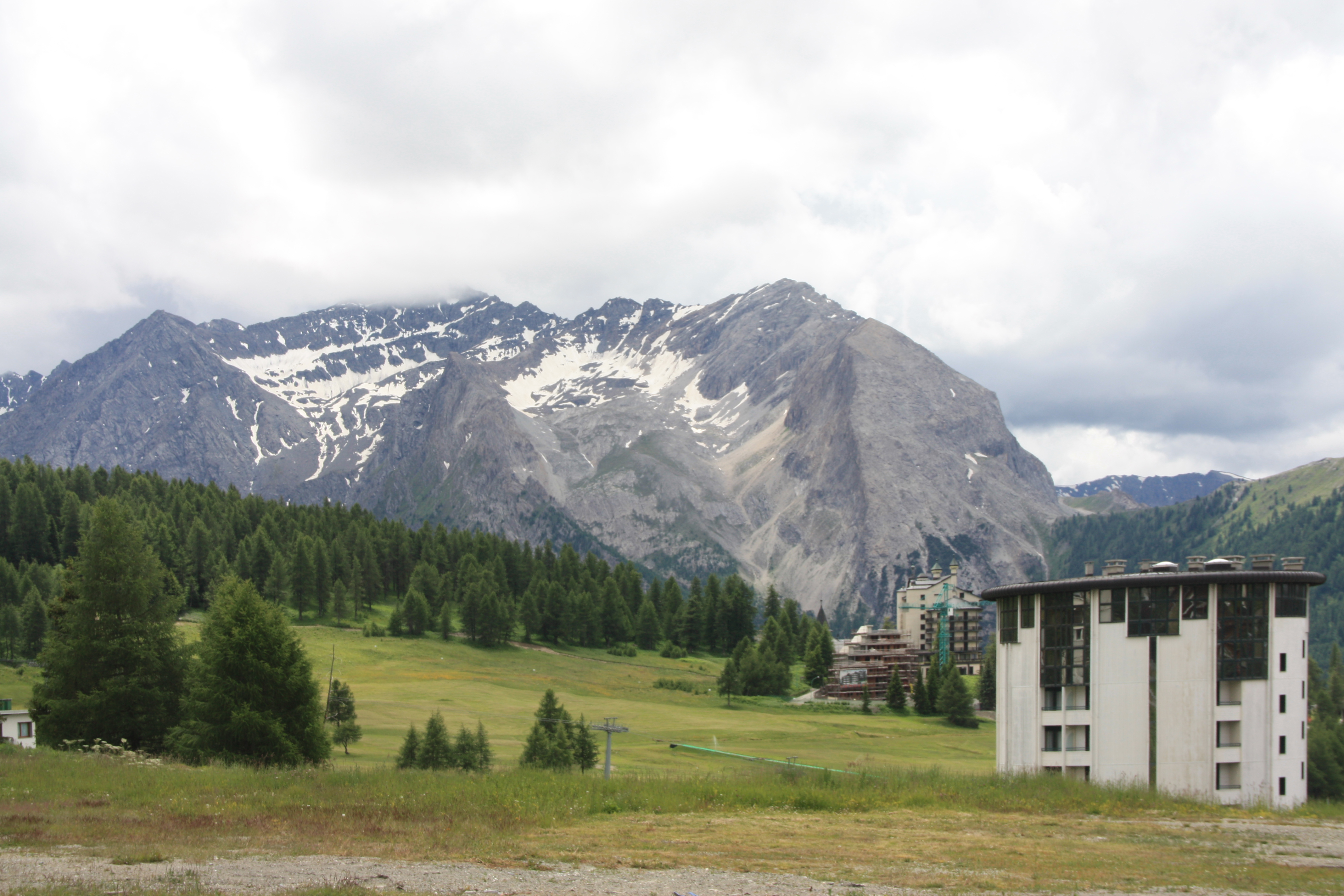 Rally Cesana - Sestriere 13 luglio 2014